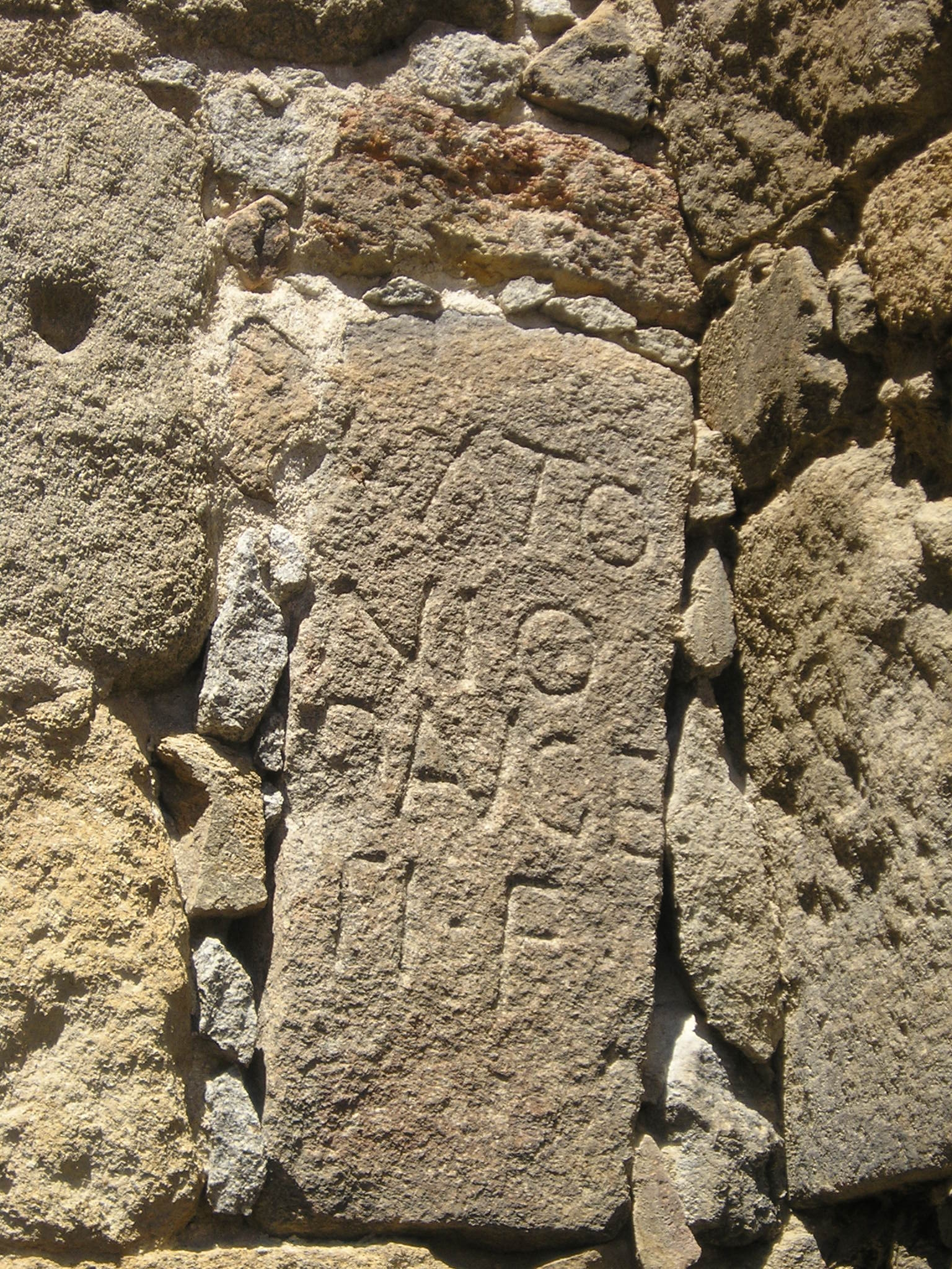 Inscripción funeraria CIL II 3865 empotrada en la Muralla medieval de Ávila, cuyo texto dice: G(aio)· ANTO//NIO/ DAVGE/TI· F(ilio)